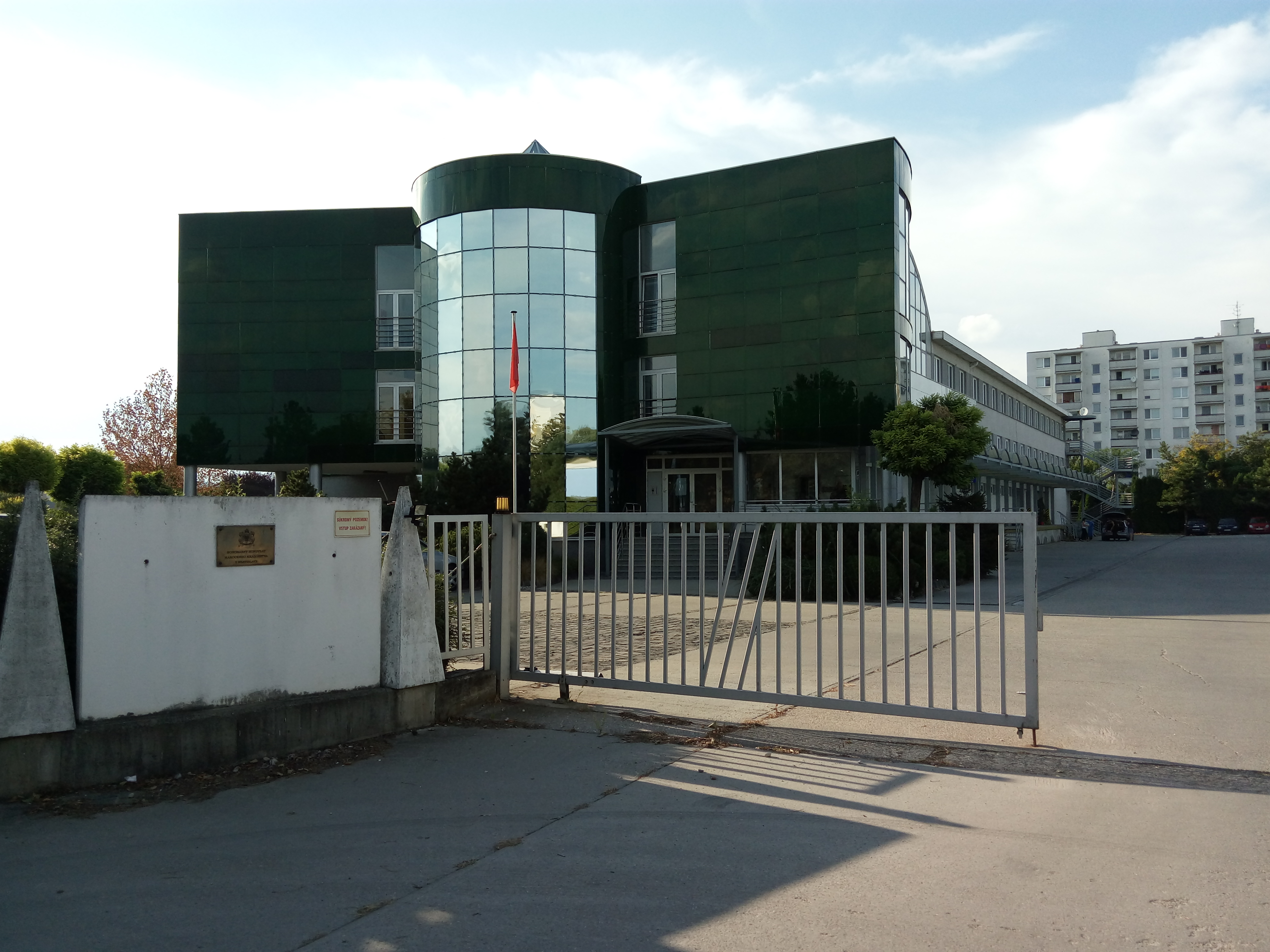 Krajná, Ružinov, Bratislava